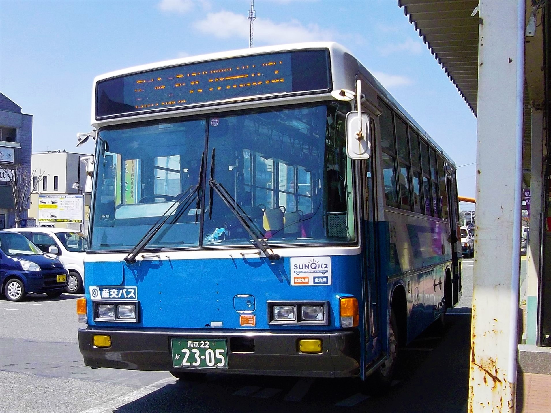 いすゞ・ジャーニーK、産交バス（旧熊南産交）で使用されていたもの